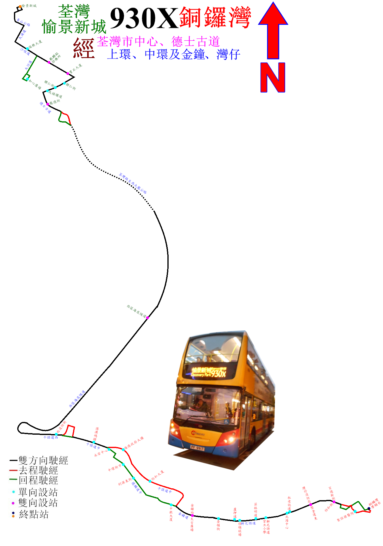 中文（香港）: 過海隧巴930X線的走線圖